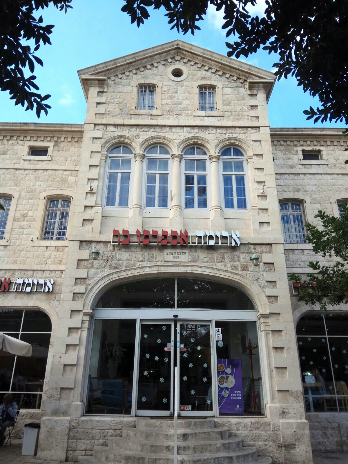 חזית בית קיק, חיפה